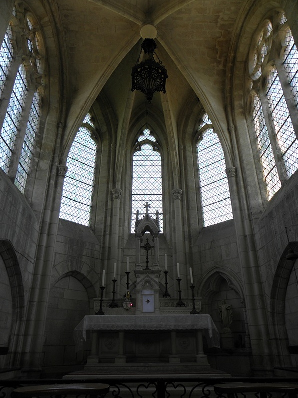 Chœur de l'église Saint-Julien de Royaucourt-et-Chailvet (02).